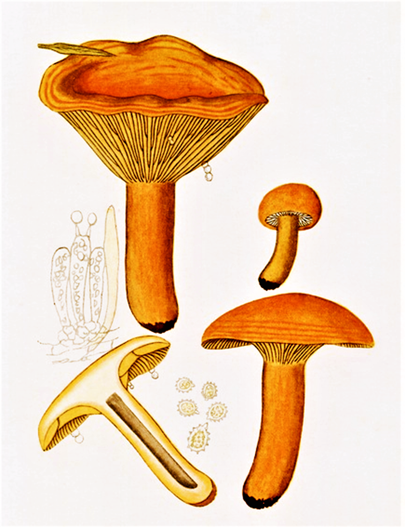 Bres.: Lactarius aurantiacus (Pers., 1801) Gray (1821)